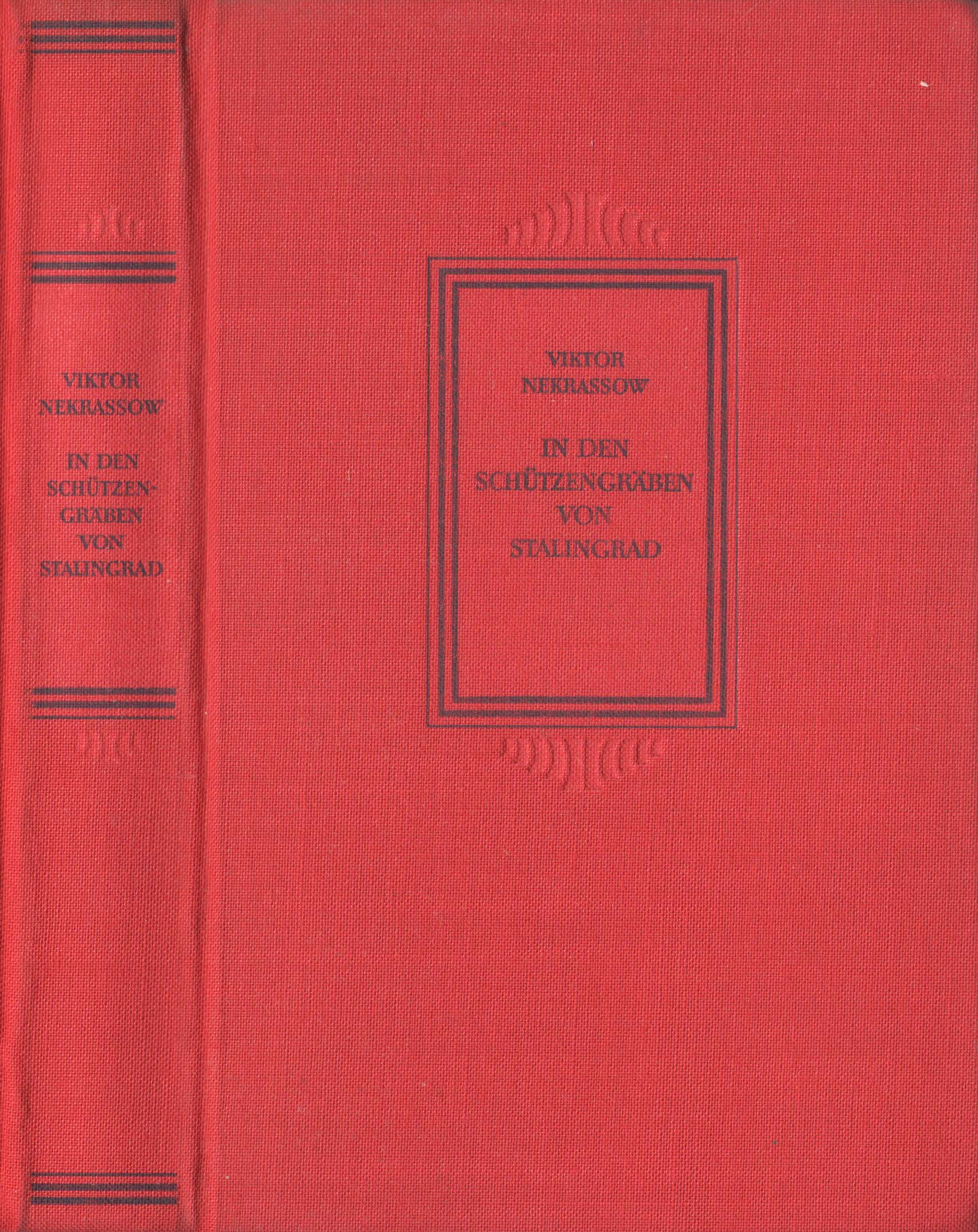 Das Buch In den Schützengräben von Stalingrad von Viktor (Wiktor) Nekrassow erschien 1954 vom Aufbau-Verlag Berlin.